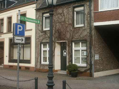 Grieth, Griether Markt 28 en 26; huisvesting van het Hanselädchen en het Heimatmuseum